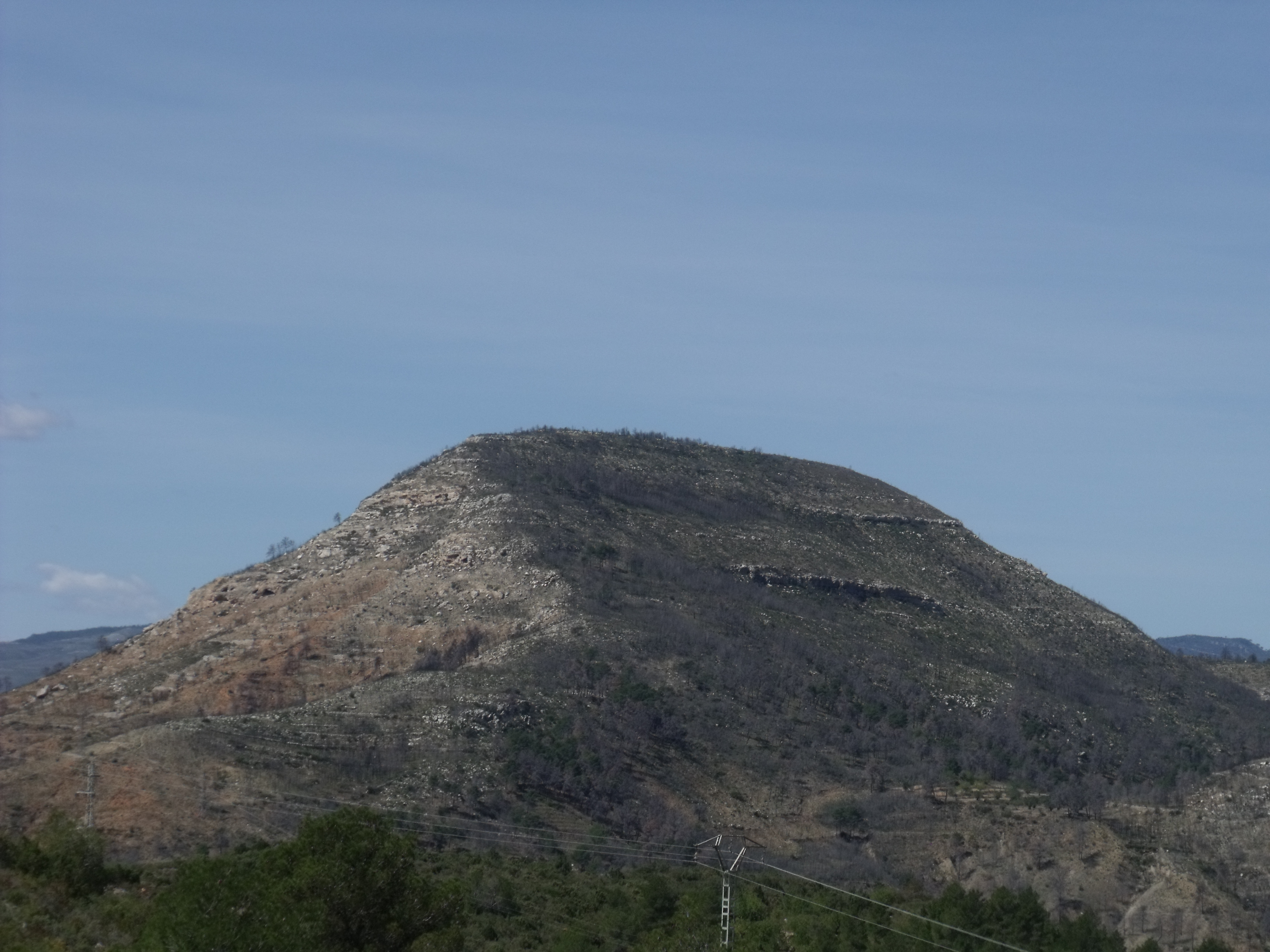 El Montratón visto desde el castillo de Macastre